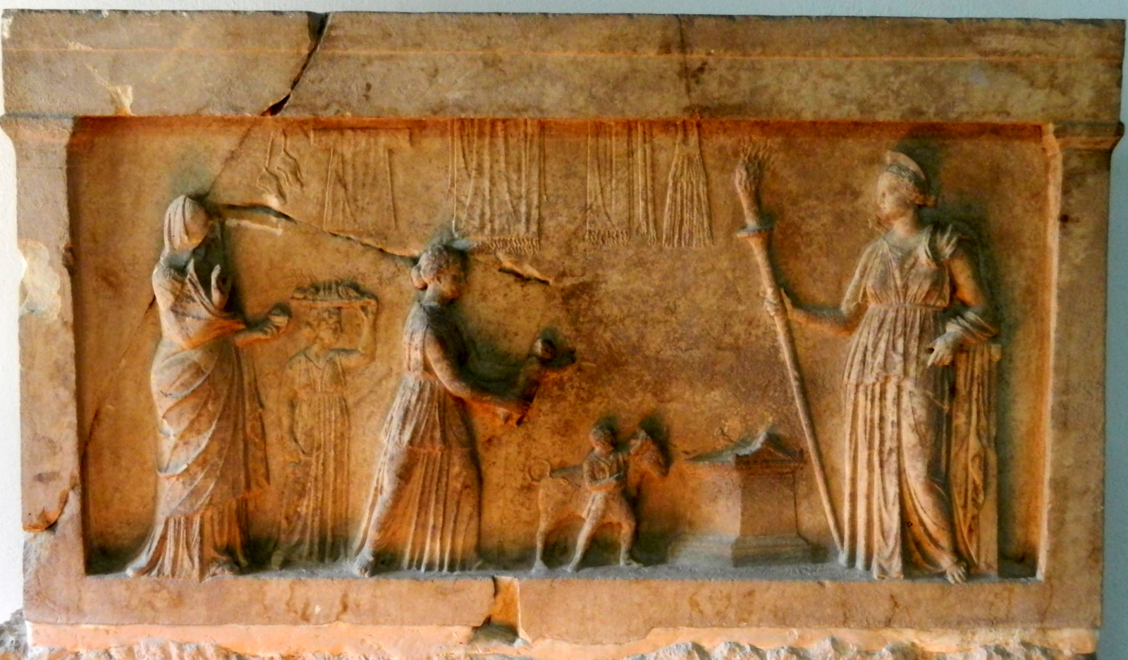 Płaskorzeźba przedstawiająca dziękczynienie bogini Artemidzie za udany poród i połóg. Szczęśliwa, młoda kobieta przedstawia swe dziecko ; starsza kobieta, najpewniej matka lub teściowa, ofiarowuje bóstwu kosztowne prezenty, najpewniej biżuterię, niesione w eleganckim, specjalnie w tym celu używanym ówcześnie pudełku (do którego podobne prezentowane są w zbiorach tej placówki) ; mały służący prowadzi ofiarnego byczka ; kobieta, zapewne także należąca do służby niesie bóstwu tacę (dyskos) z ofiarami owoców - zapewne granat, jabłko i winogrona - i miodowych słodyczy ; w tle, także ofiarowywane, szaty używane przez kobietę w czas porodu i połogu. Przemiły, ochotniczo oprowadzający nas pracownik muzeum, szczególną uwagę kierował na tę właśnie płaskorzeźbę, jako wyjątkową - rzadką - pełną informacyjnej treści. Ekspozycja i objaśnienia, ze standardowym przyzwoleniem na wykonanie niespecjalistycznych fotografii, dzięki uprzejmości Okręgowego Muzeum Archeologicznego w Lamii, w Grecji, pory zwiedzania 8-15:oo.